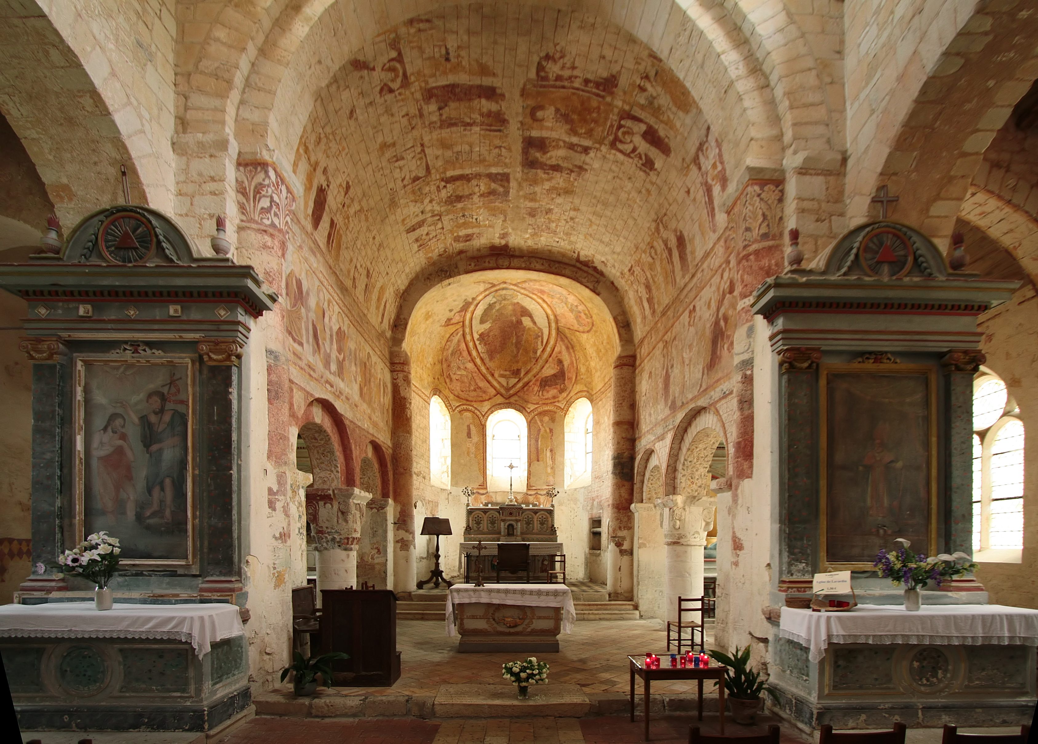 Lavardin im Departement Loir-et-Cher/Frankreich - Kirche Saint-Genest, Blick in den Hauptchor.